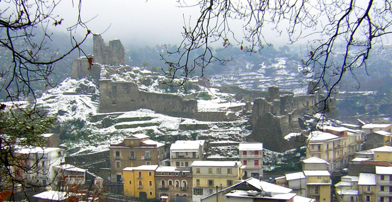 Lamezia Terme, Centro storico: Castello Normanno/Svevo sotto la neve. Nonostante il clima mite della città, non è raro che il centro urbano venga imbiancato durante gli inverni più freddi. L'immagine si riferisce alla nevicata dell'8 marzo 2005. Autore: Francesco Cataudo